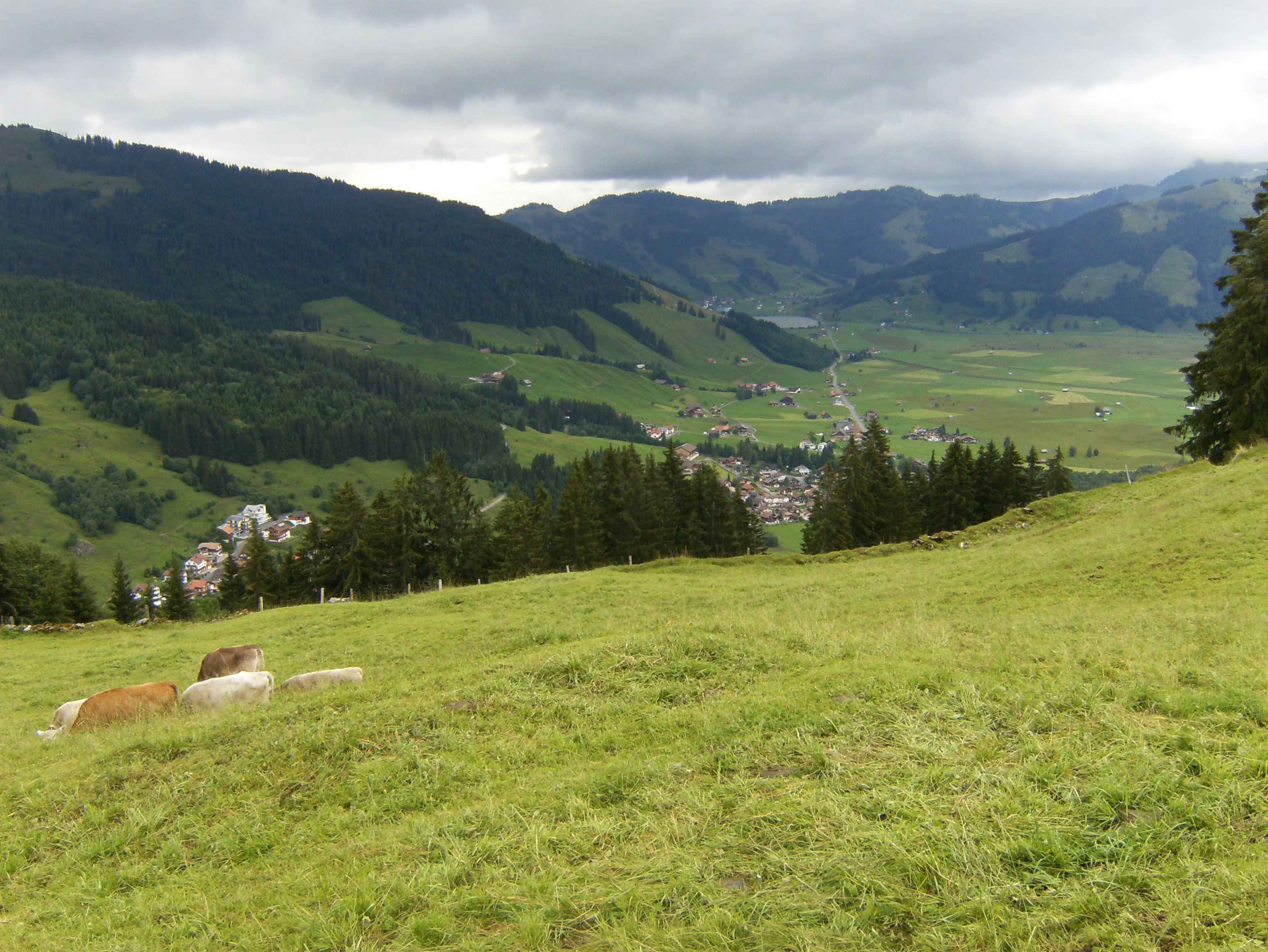 Unteriberg SZ, Schweiz.